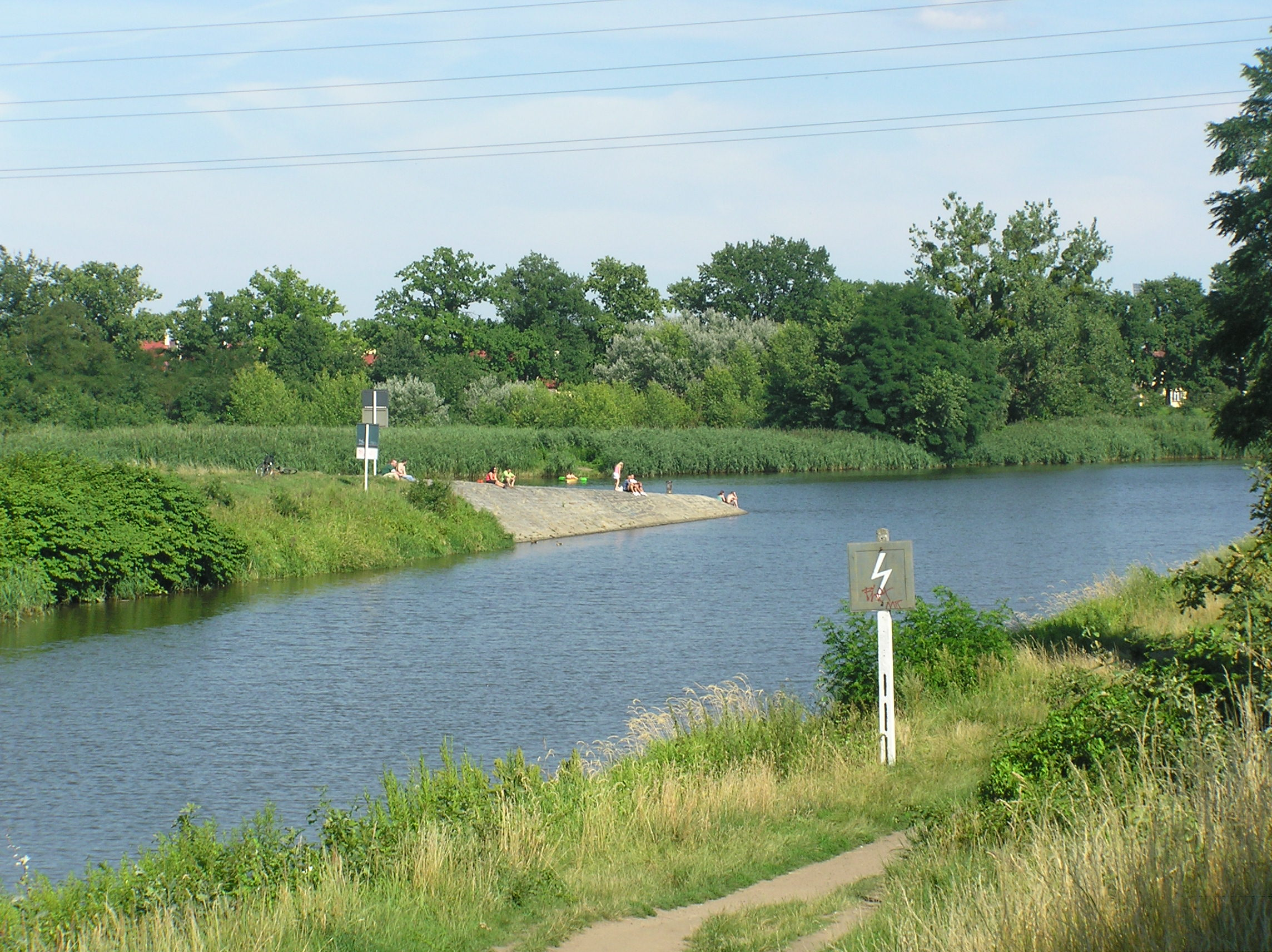 Wrocław, Odra, początek Kanału Miejskiego (bifurkacja - Stara Odra)